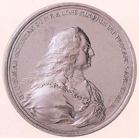 Johann Karl Hedlinger, Медаль "В память заслуг графа А.И. Остермана", 1730-е гг. Иверсен Ю.Б. Медали в честь русских государственных деятелей и частных лиц. - Т. 2. - СПб., 1883.- С. 73-74; ГИМ 88694 Нум КП 978510 (серебро)